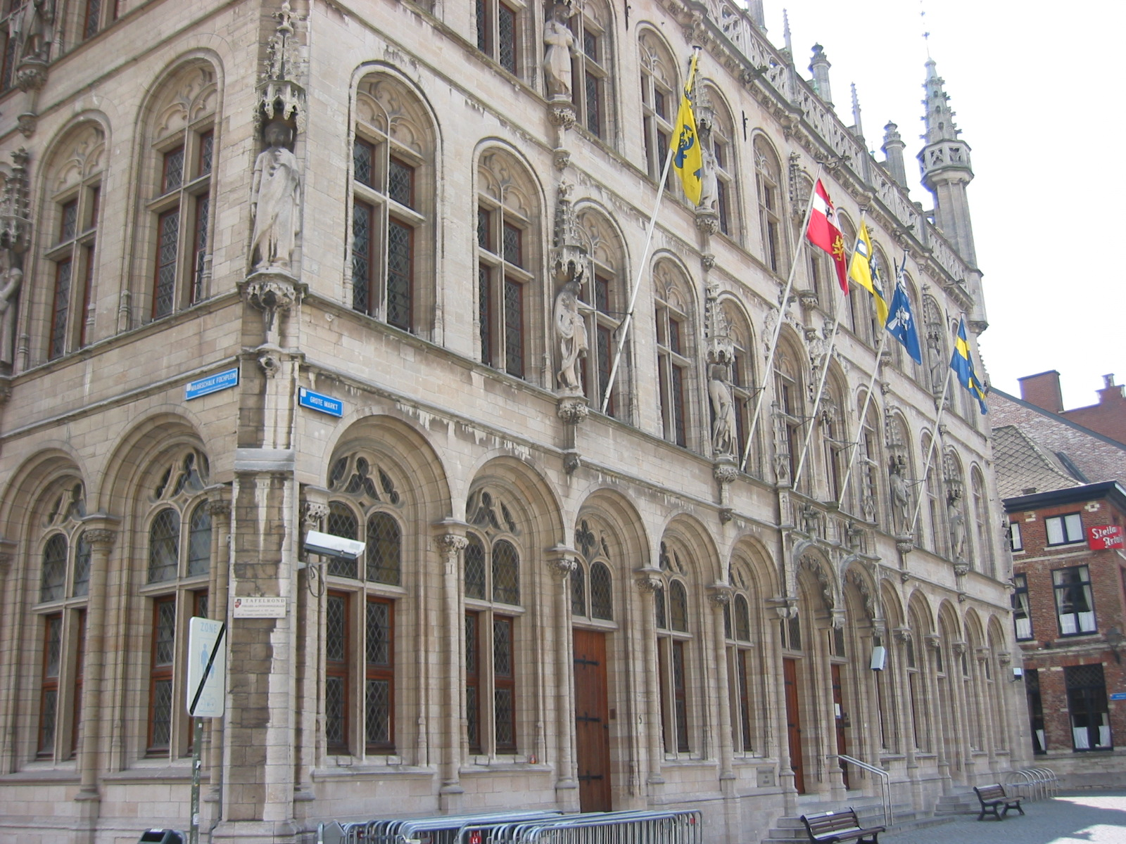 Het Tafelrond op de Grote Markt in Leuven (Gemaakt in juni 2006)